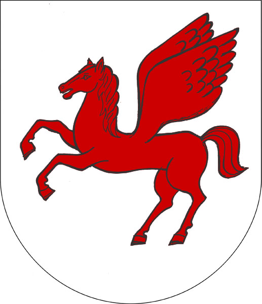 Znak obce Mrákotín (okres Chrudim).